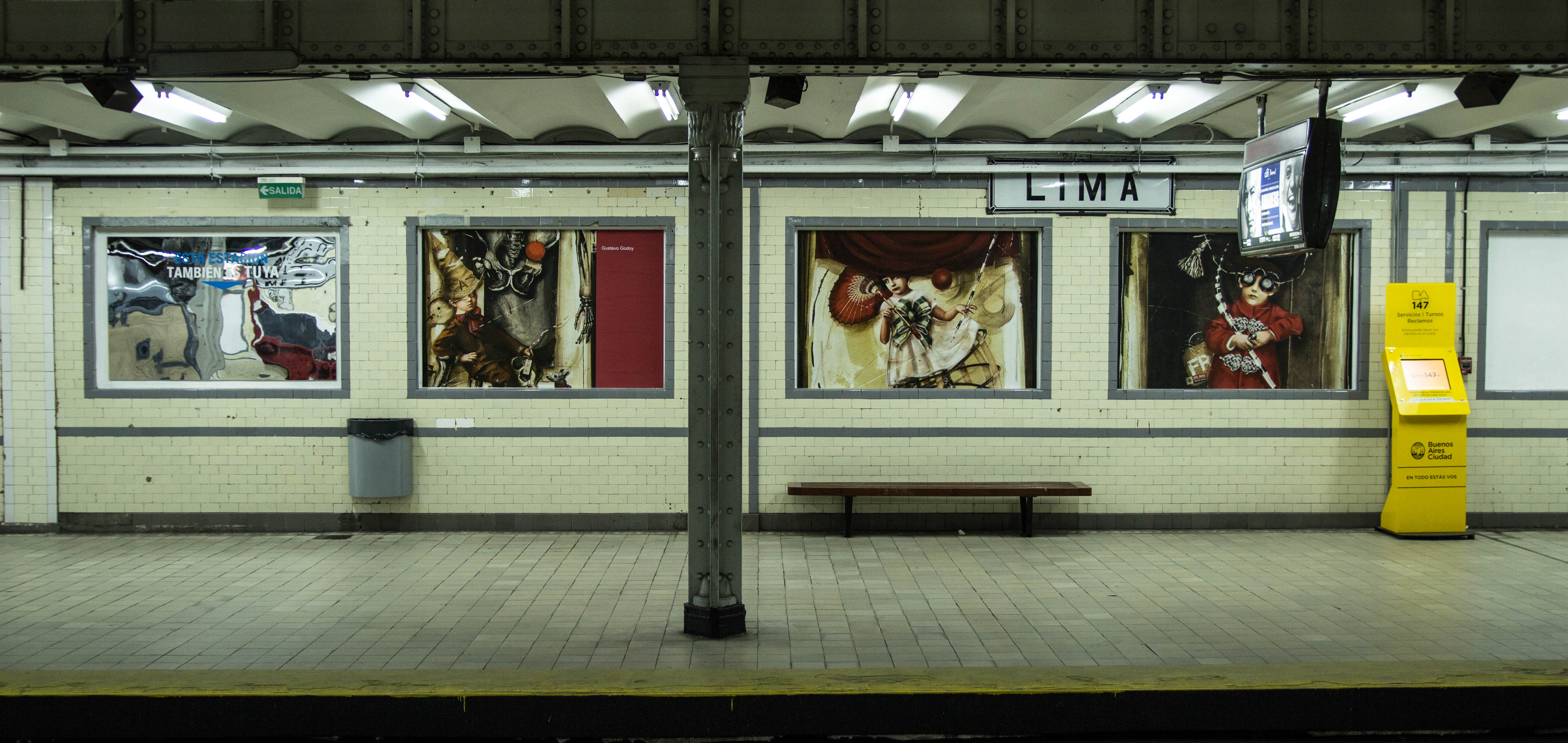 Anden de la estación subterránea